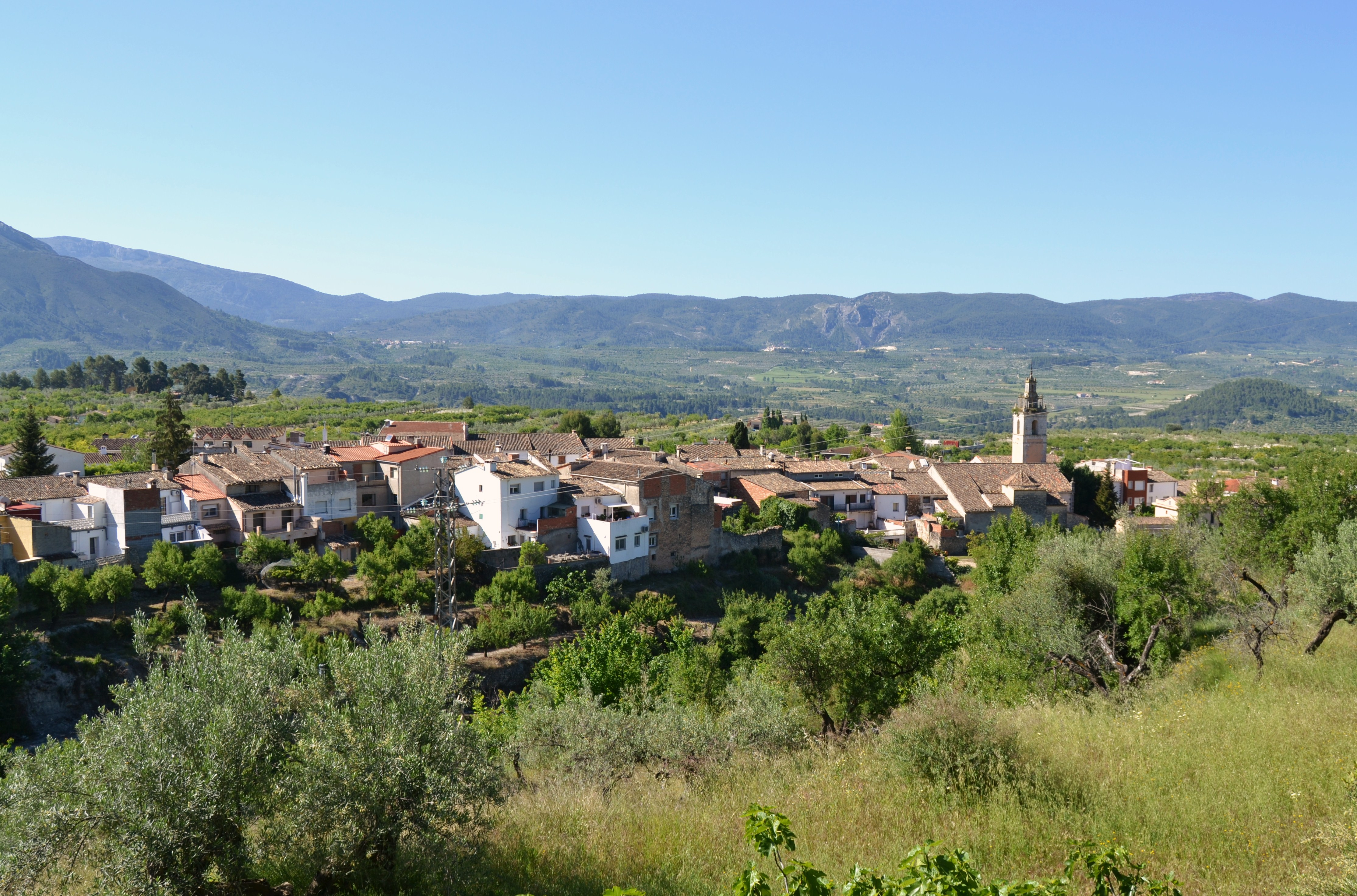 Vista general de Millena, el Comtat, País Valencià.